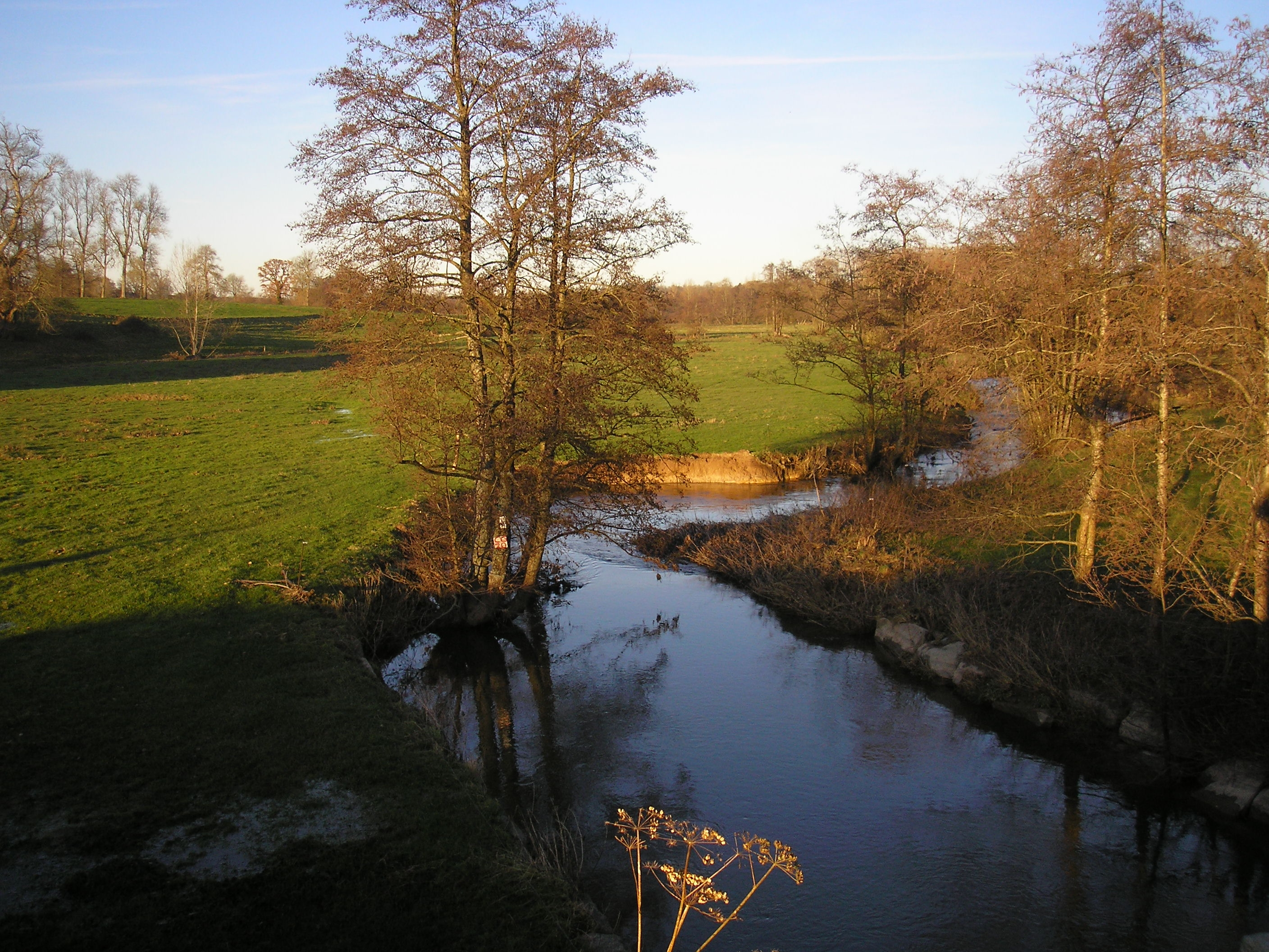 La Drôme entre Vidouville, à gauche, et La Vacquerie, à droite (Normandie, France).